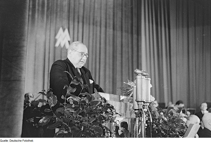 Original image description from the Deutsche Fotothek Eröffnungsfeier der Frühjahrsmesse im Städtischen Schauspiel